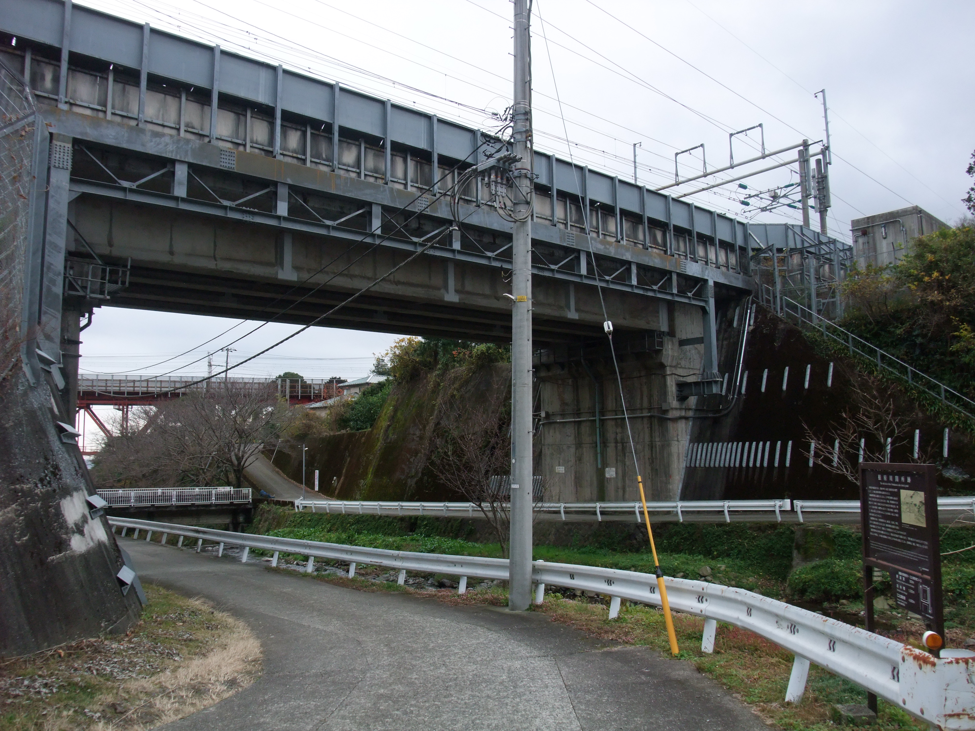 東海道新幹線の白糸川橋梁。かつて橋の直下に箱根脇関所の一つ根府川関所があったが、橋梁建設に伴う河川改修で川底に沈んでしまった。その説明板が右側にある。